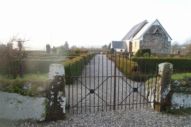 Hover Kirke set fra øst